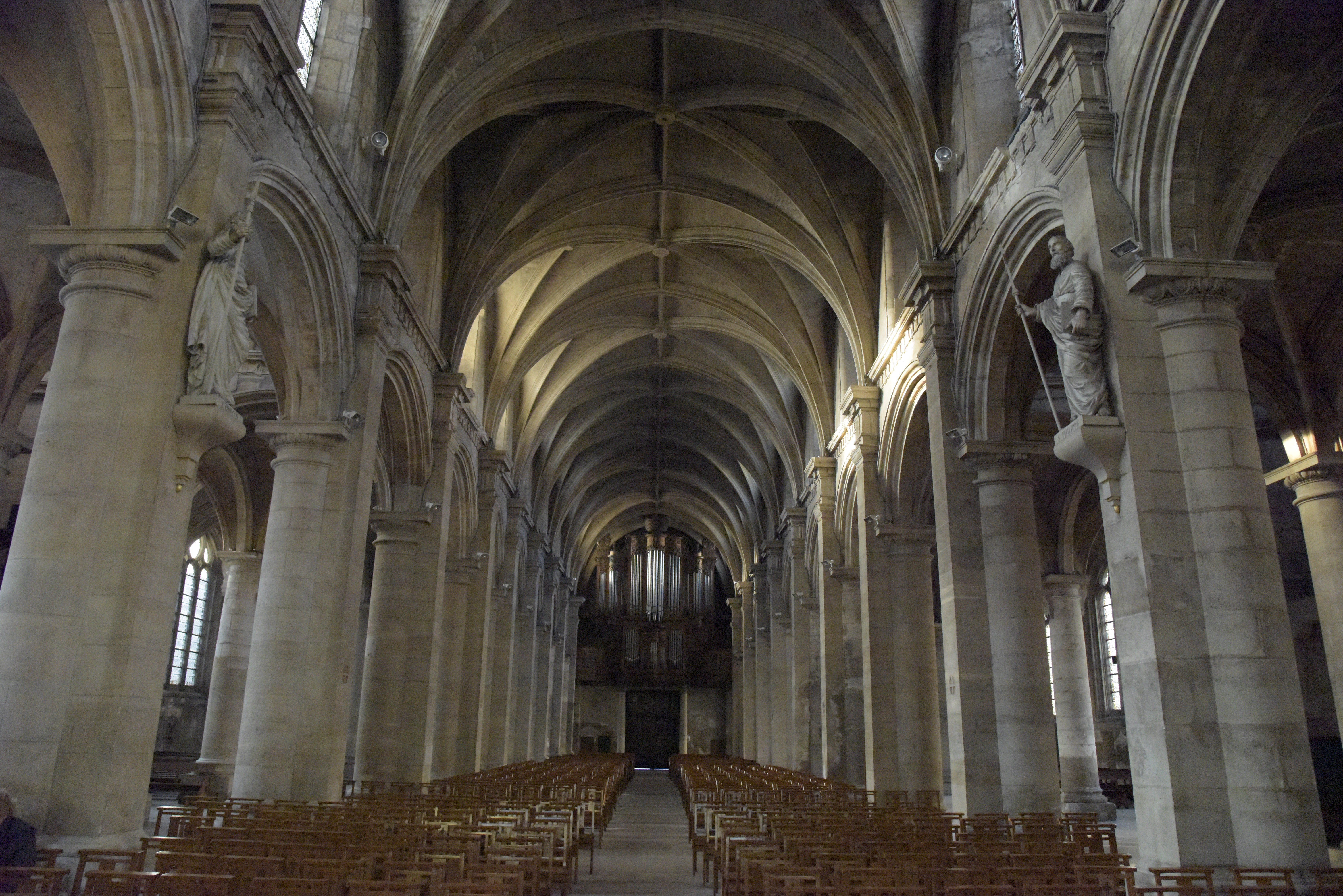 La nef de la cathédrale Notre-Dame